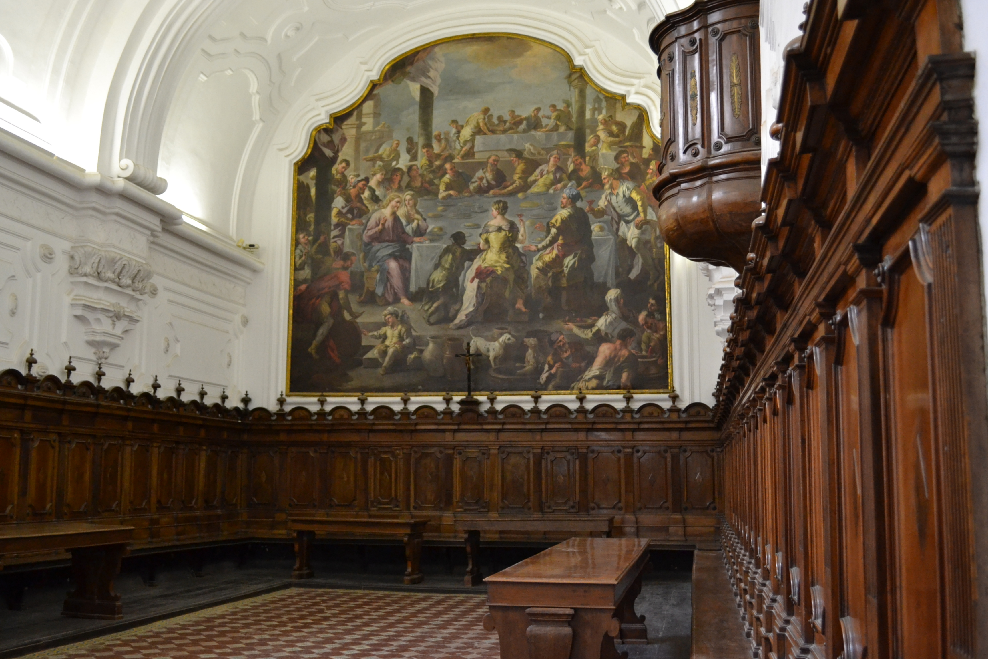 Certosa di San Martino di Napoli - Refettorio (in primo piano la grande tela di Nicola Malinconico su Le nozze di Cana